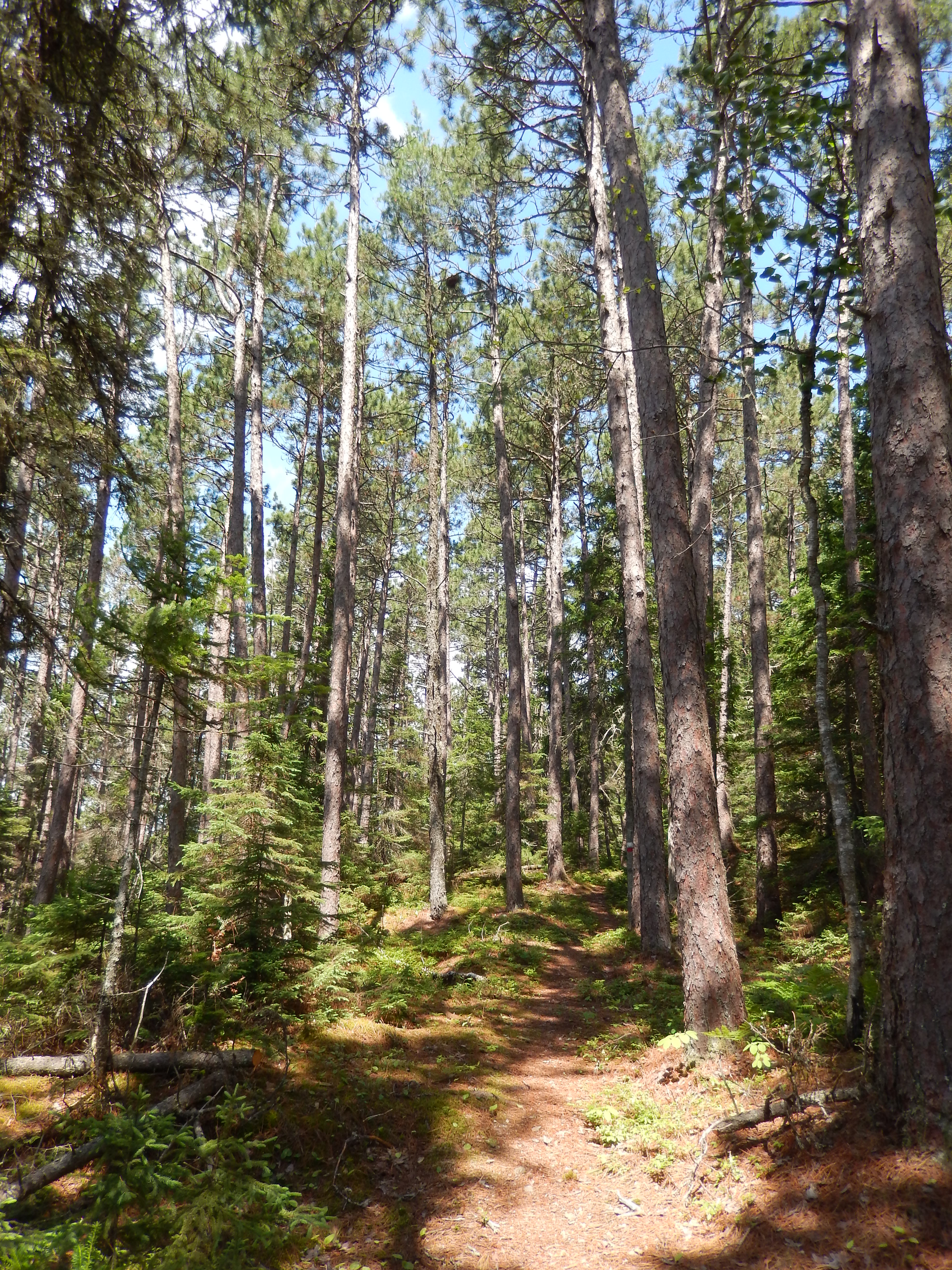 Pinède de la montagne du Fourneau dans le Parc national du lac Témiscouata